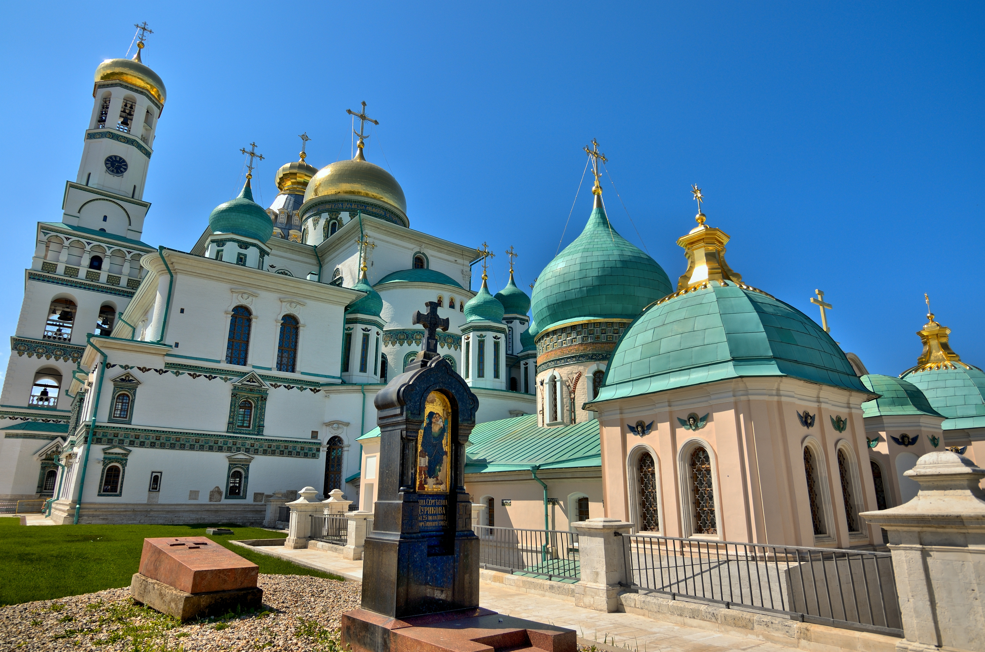 Ансамбль Ново-Иерусалимского (Воскресенского) монастыря: улица Советская, 2, Истра, Истринский район, Московская область